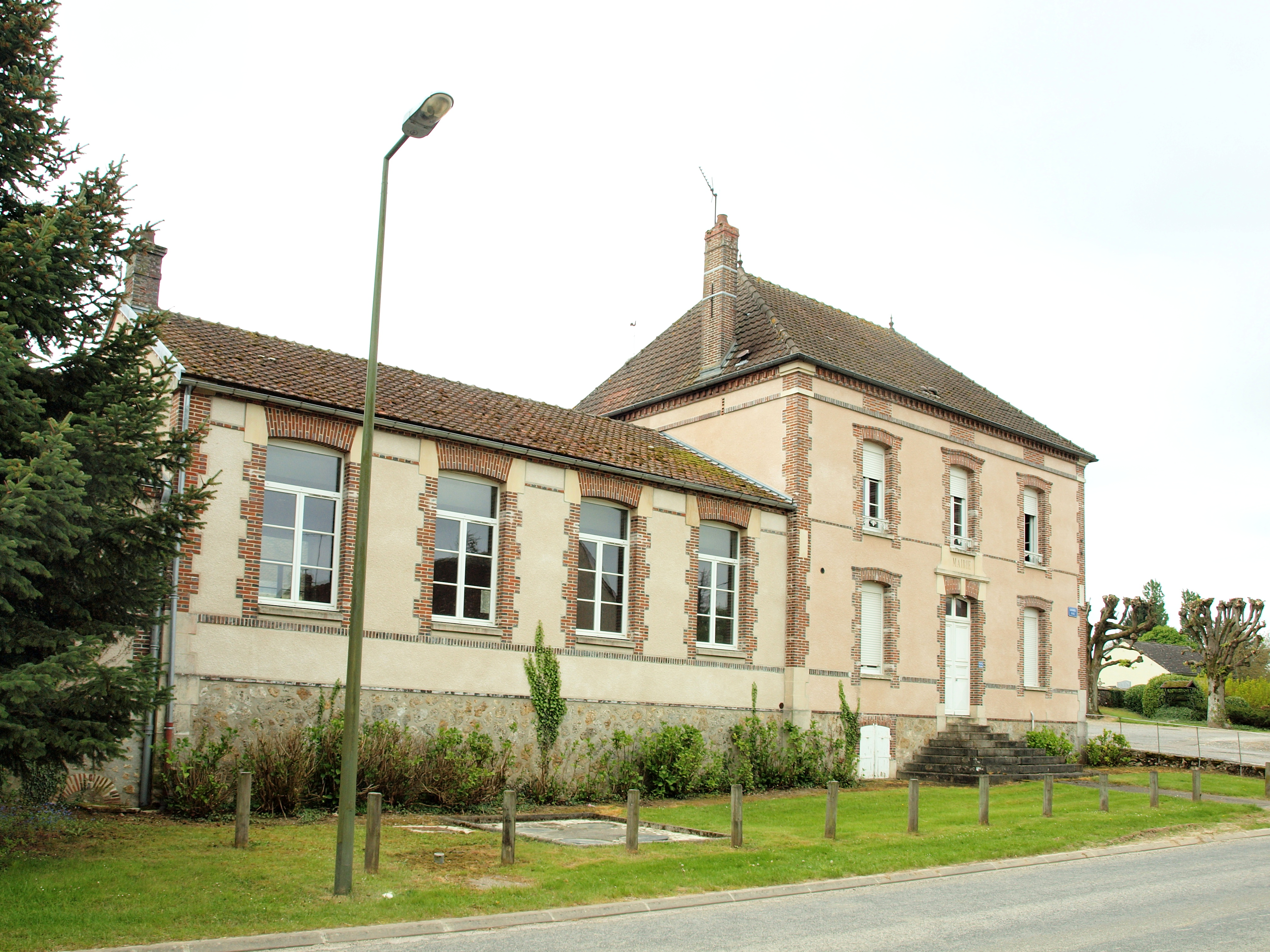 Les Essarts-lès-Sézanne (Marne, France)